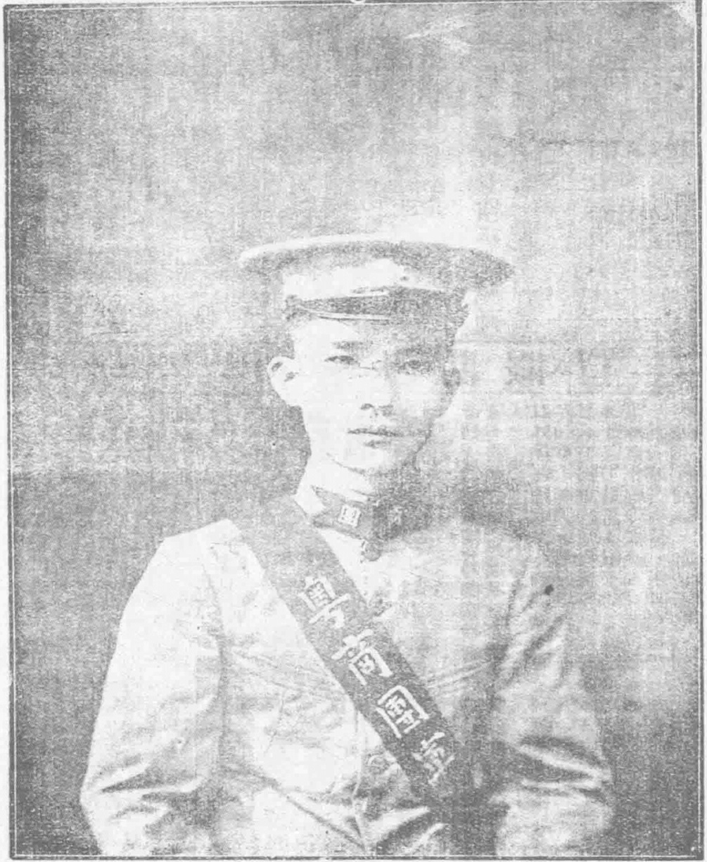 邹竞先照片